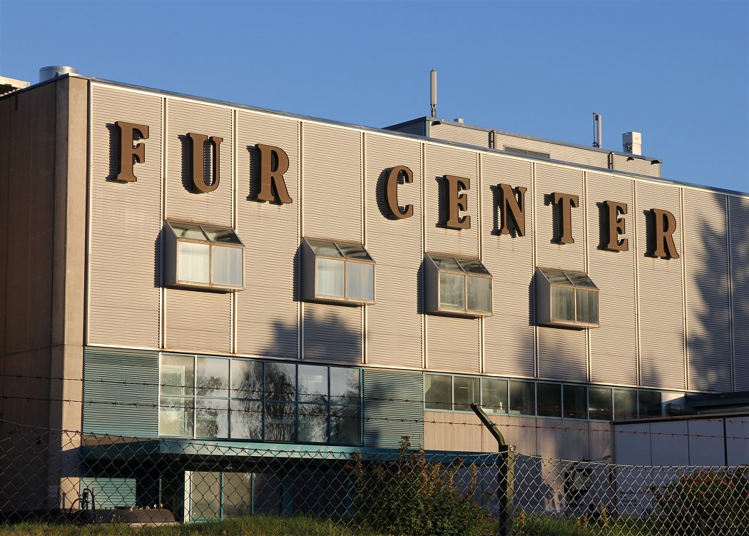 Pörssiyhtiö Saga Fur Oyj:n toimitalon (Fur Center) yksityiskohta Vantaan Varistossa. Vuonna 1978 valmistuneen rakennuksen on suunnitellut arkkitehti Osmo Mikkonen.